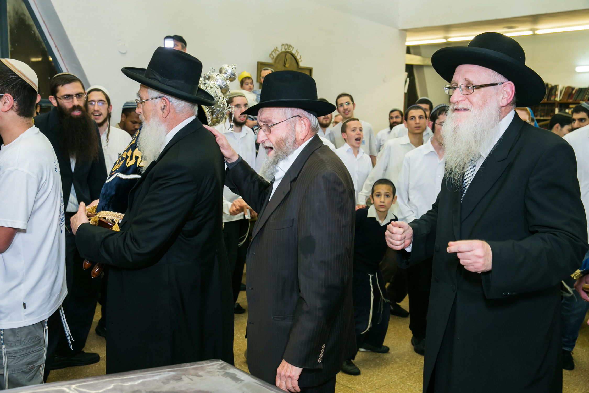 ישיבת מרכז הרב.